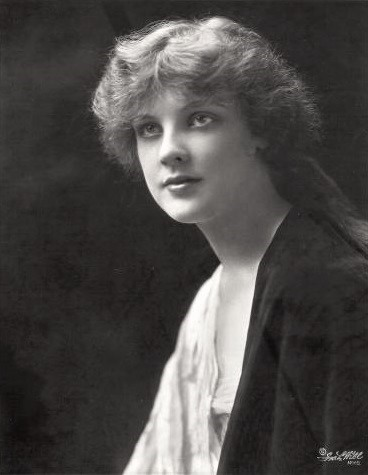 Justine Johnstone